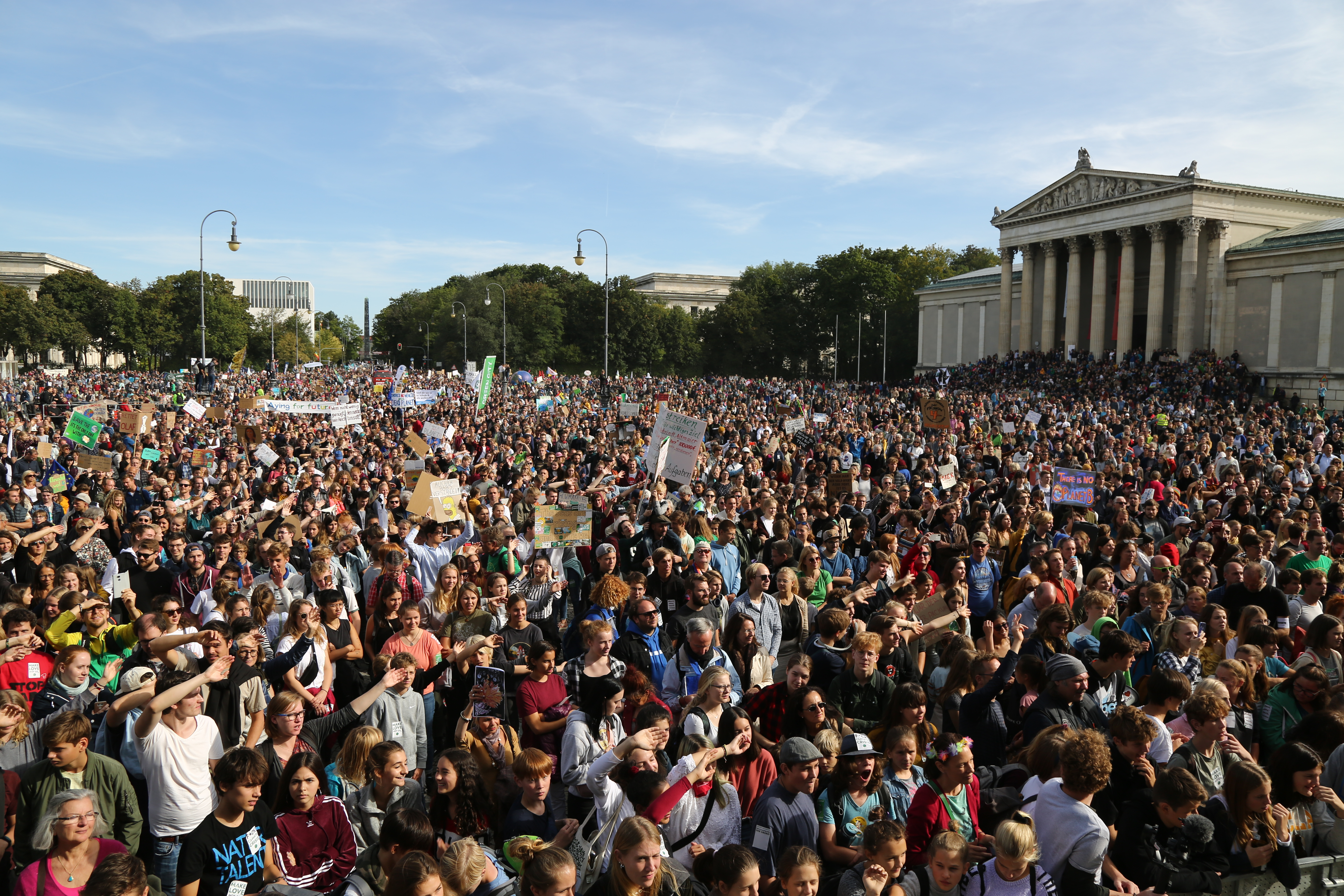 Fridays for future München, am 2019-09-20